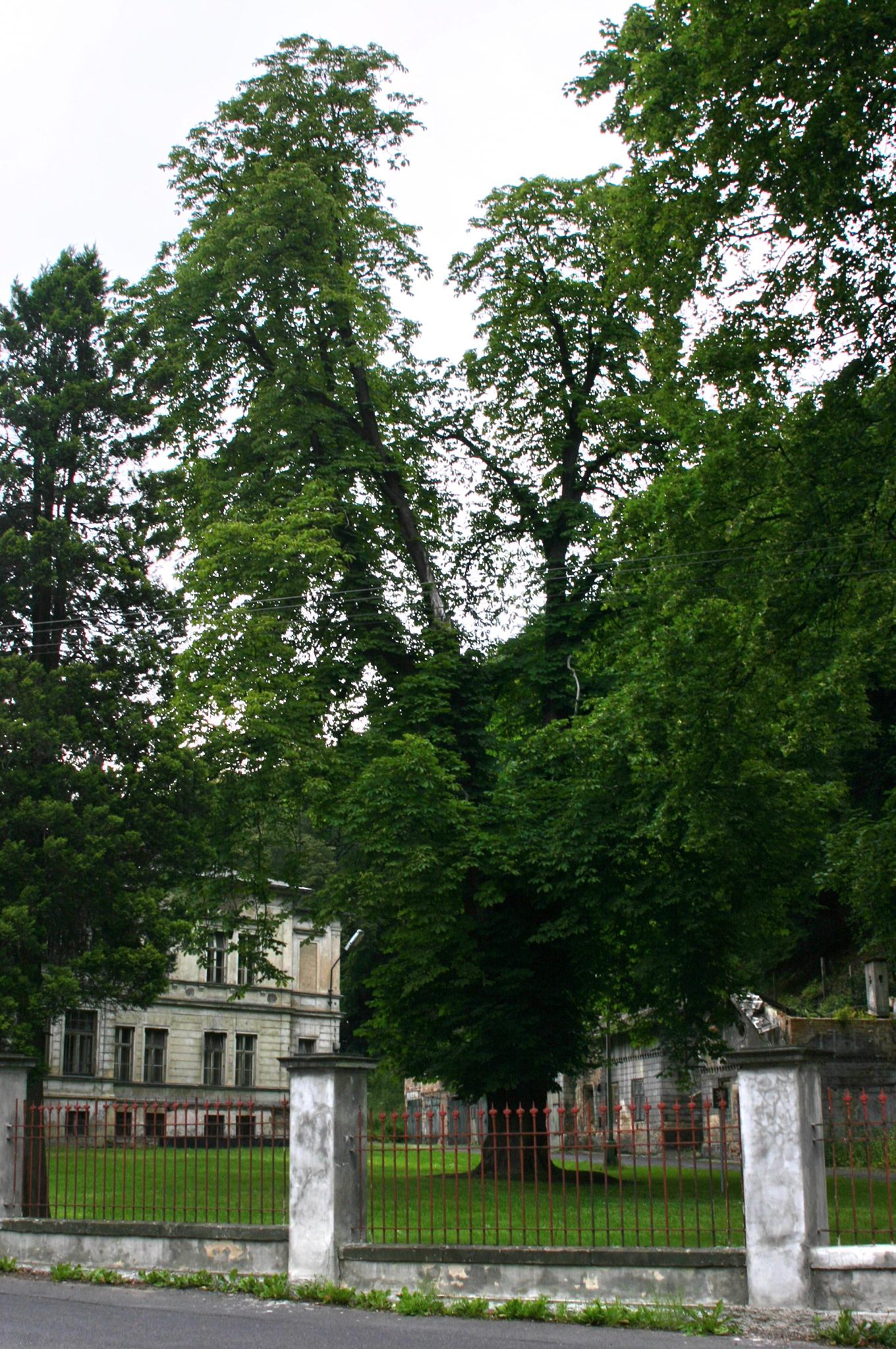 Chráněná lípa v Šumné u Litvínova